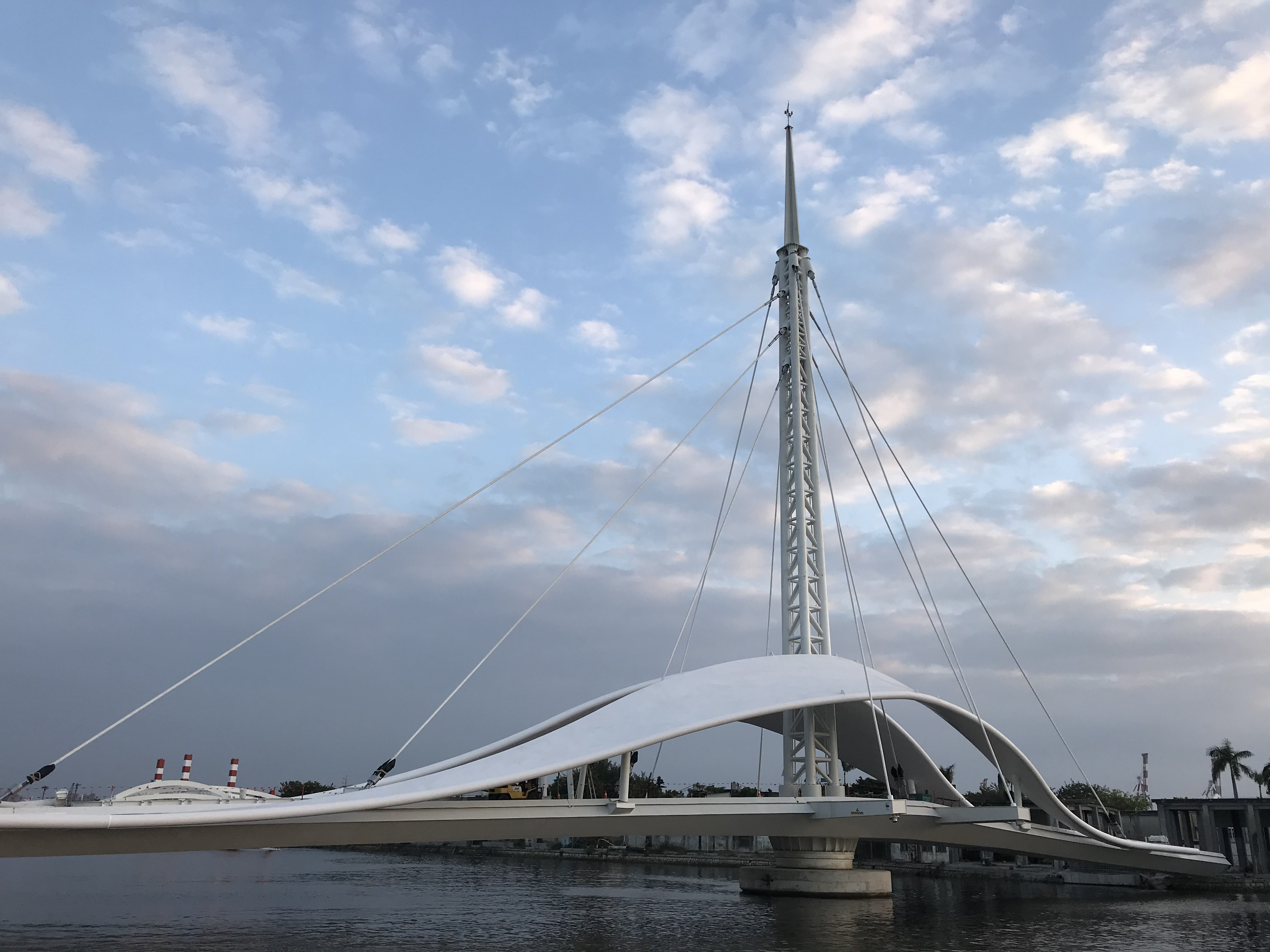 橫跨於臺灣高雄市高雄港第三船渠的大港橋